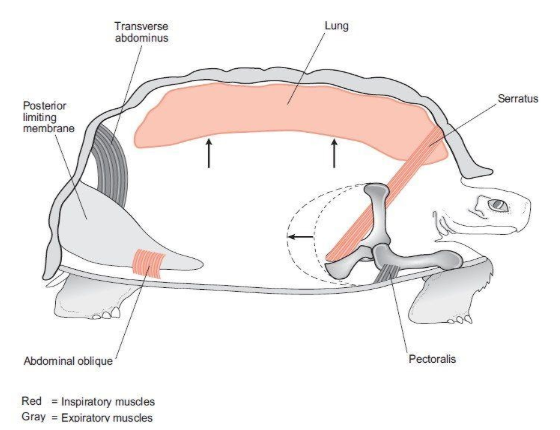 Sistema respiratorio de tartarugas